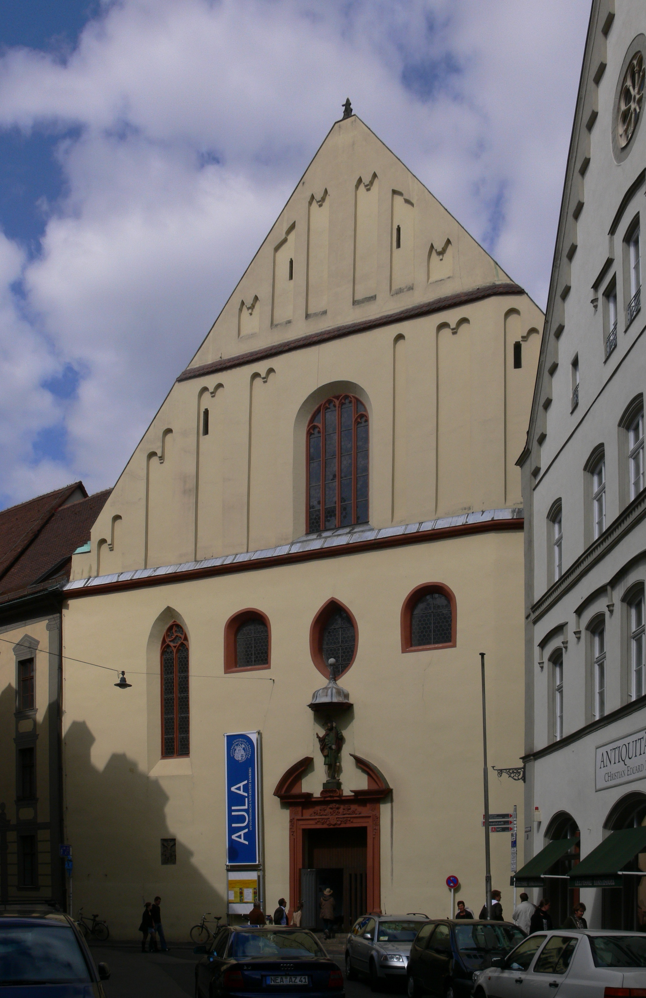 Bamberg, ehemaliges Dominikanerkloster Bamberg, ehemalige Klosterkirche (heute Aula der Universität Bamberg); Fassade